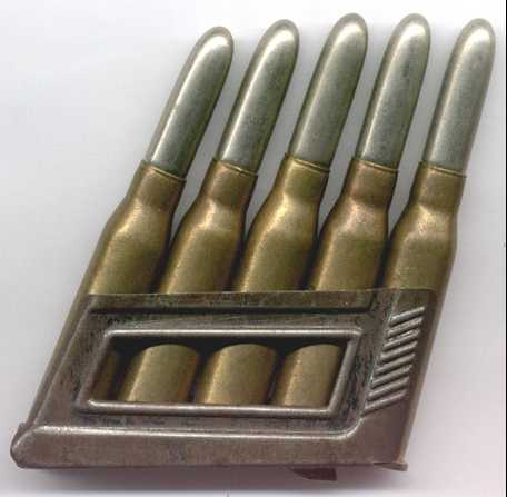 Pet nabojev 8x50R v "Mannlicher" okvirčku za polnenje.